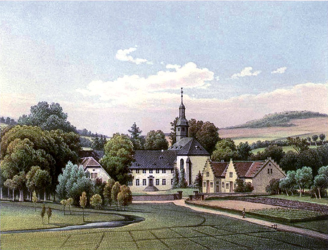 Gut Holthausen, Lithografie aus dem 19. Jahrhundert